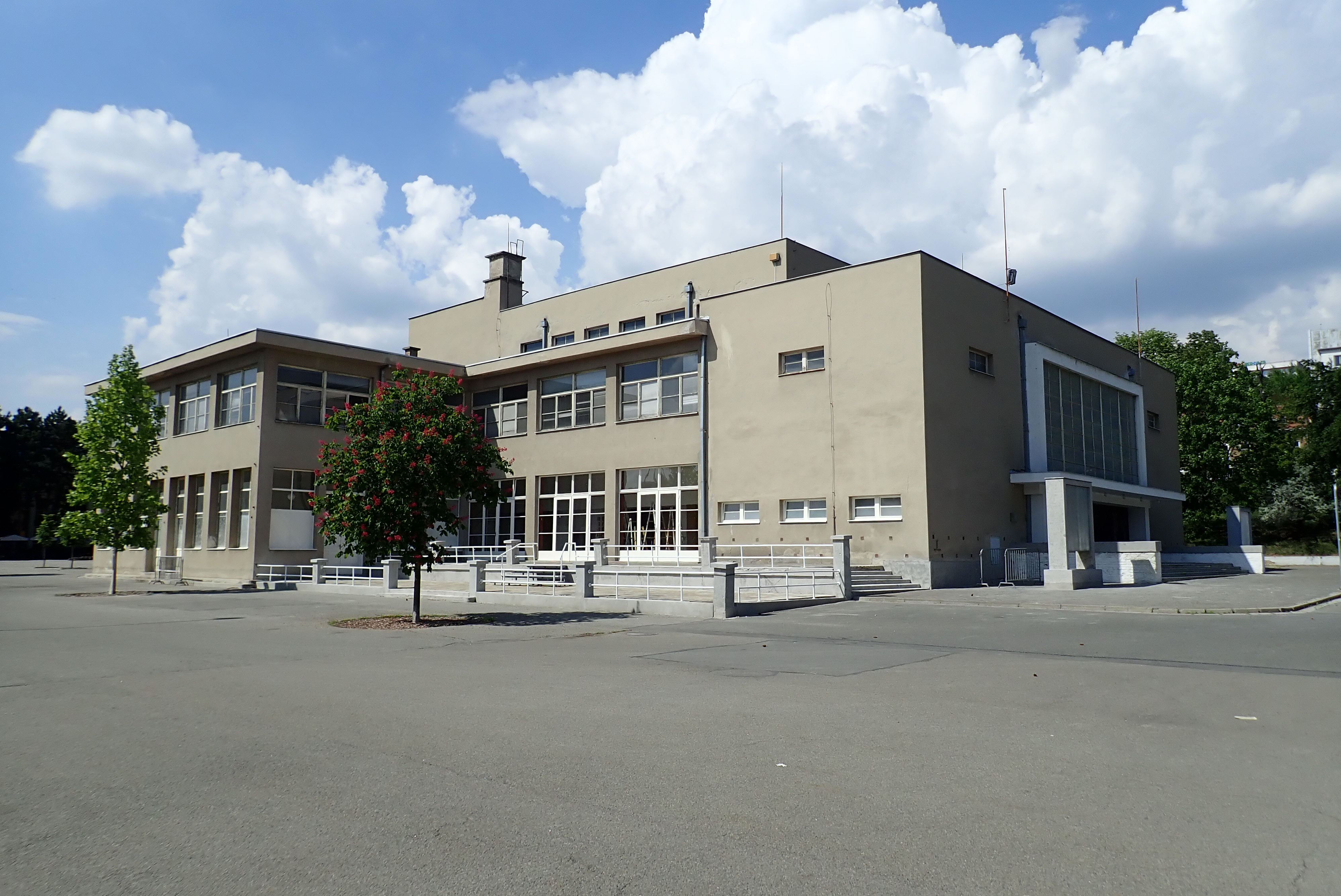 Veletržní kino, kavárna